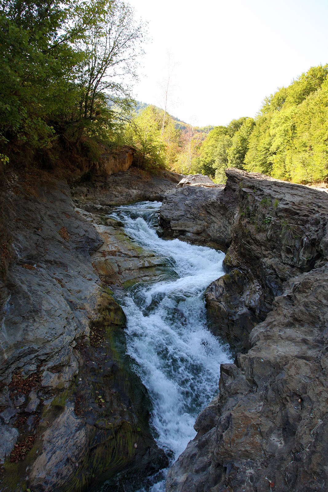 Cascada Lepsa